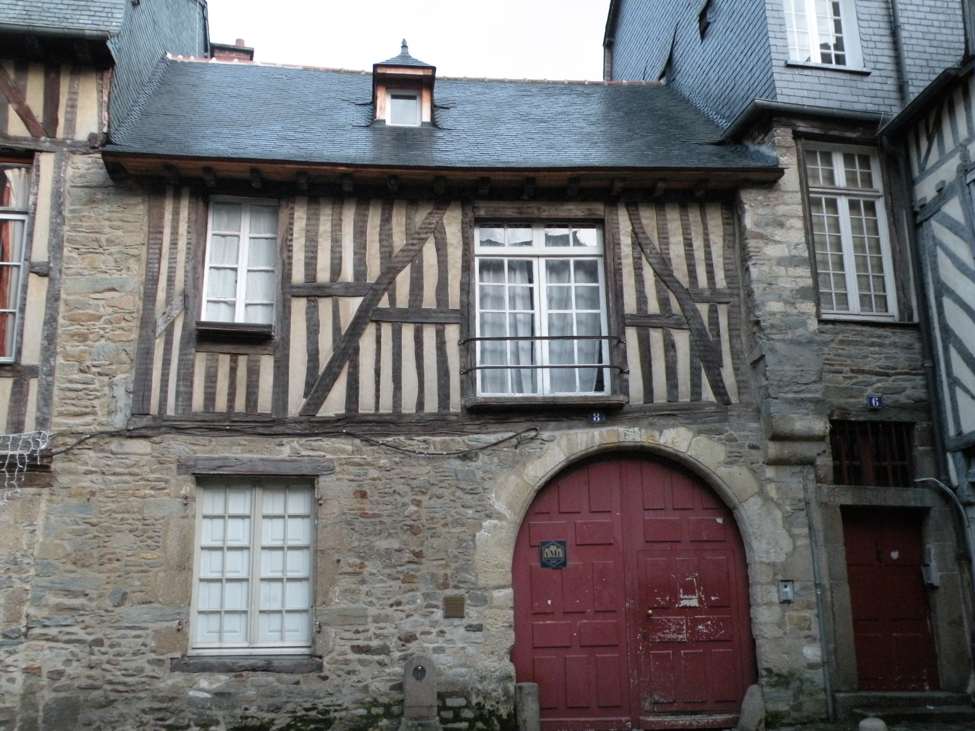 Ancienne manécanterie Saint-Pierre, 8 rue de la Psalette à Rennes.